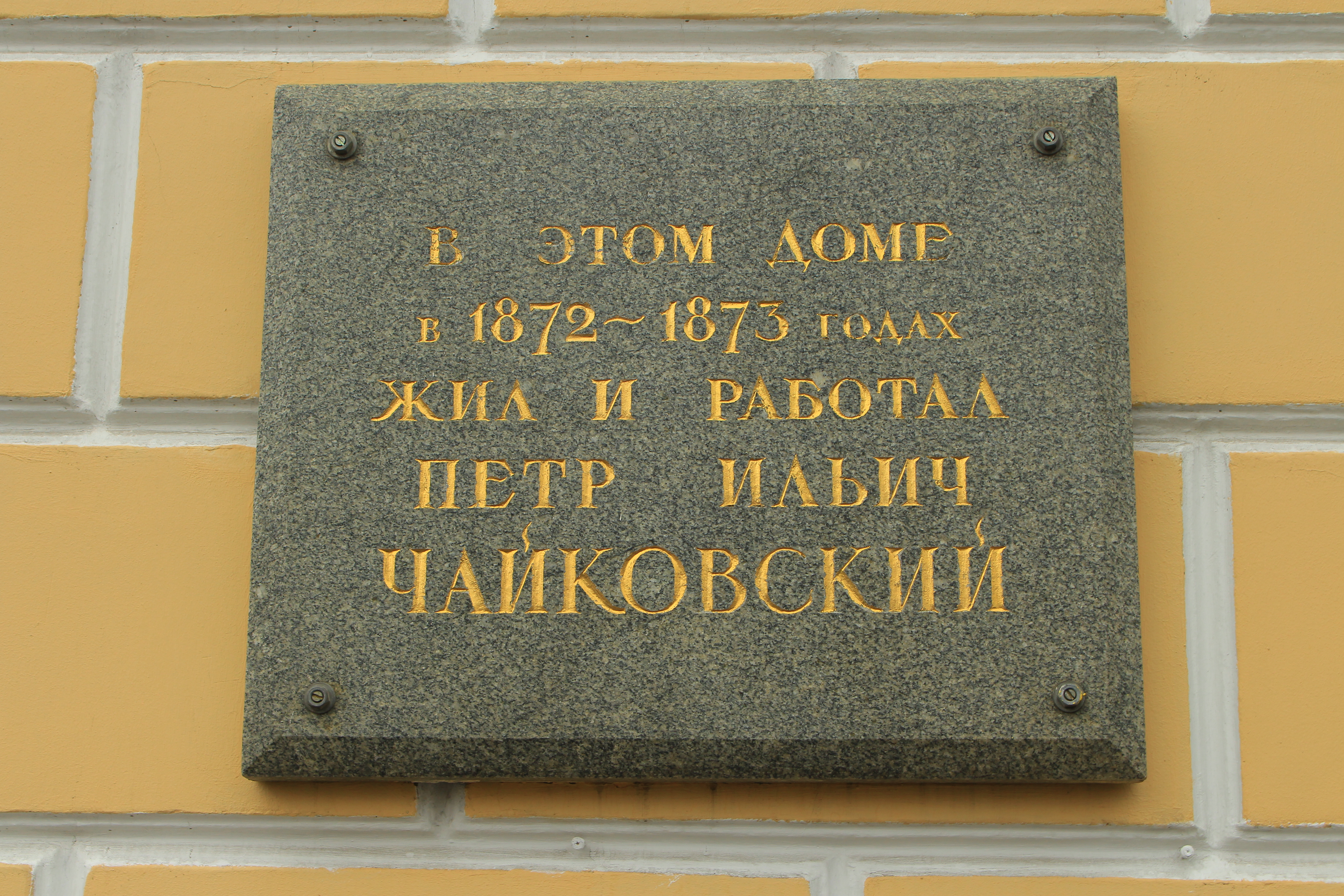 В этом доме в 1872—1873 годах жил и работал Петр Ильич Чайковский. Мемориальная доска, Москва, Кудринская площадь, 46/54